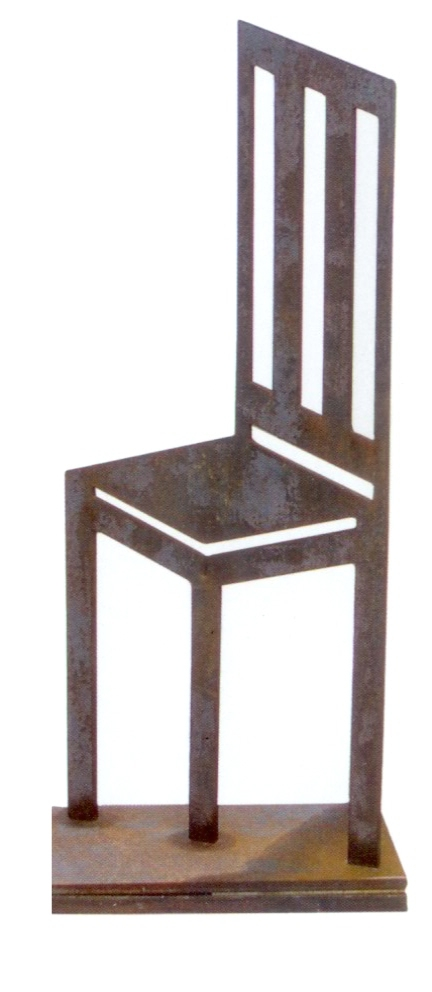 Fotografía en fondo blanco de la silla por la paz